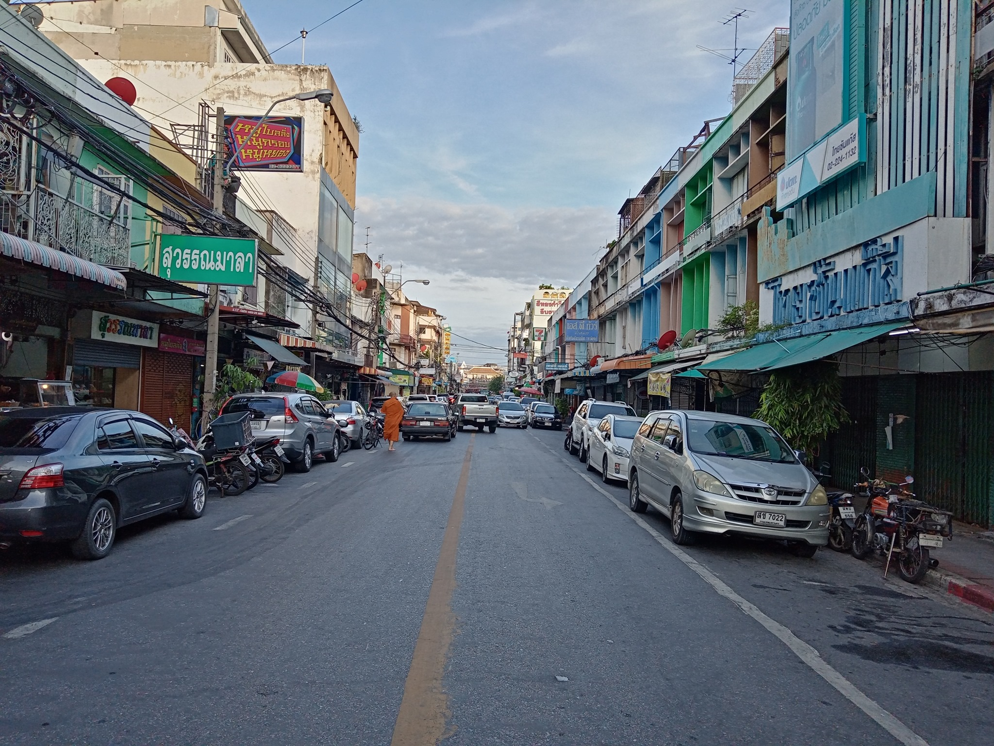 Mahannop Road.